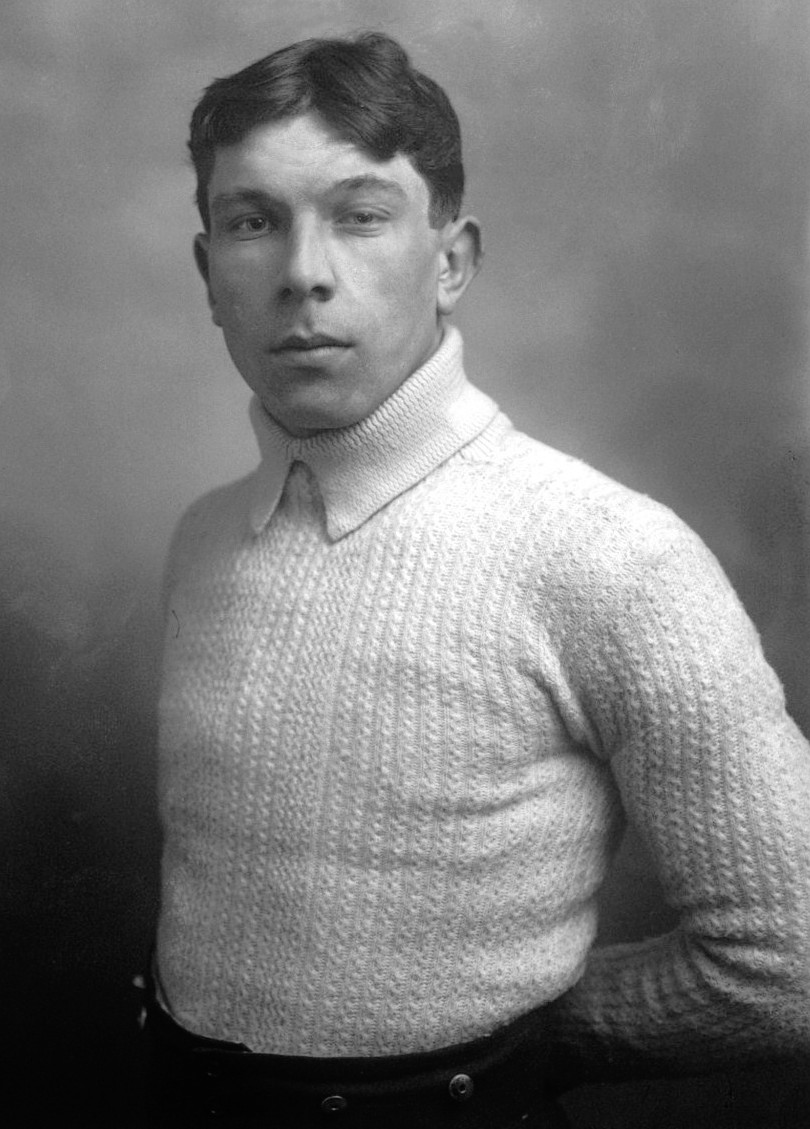 Photo de Pierre Chayrigues en 1913, footballeur français.